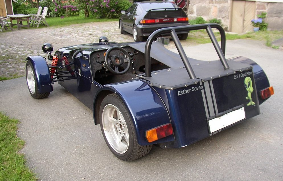 Esther